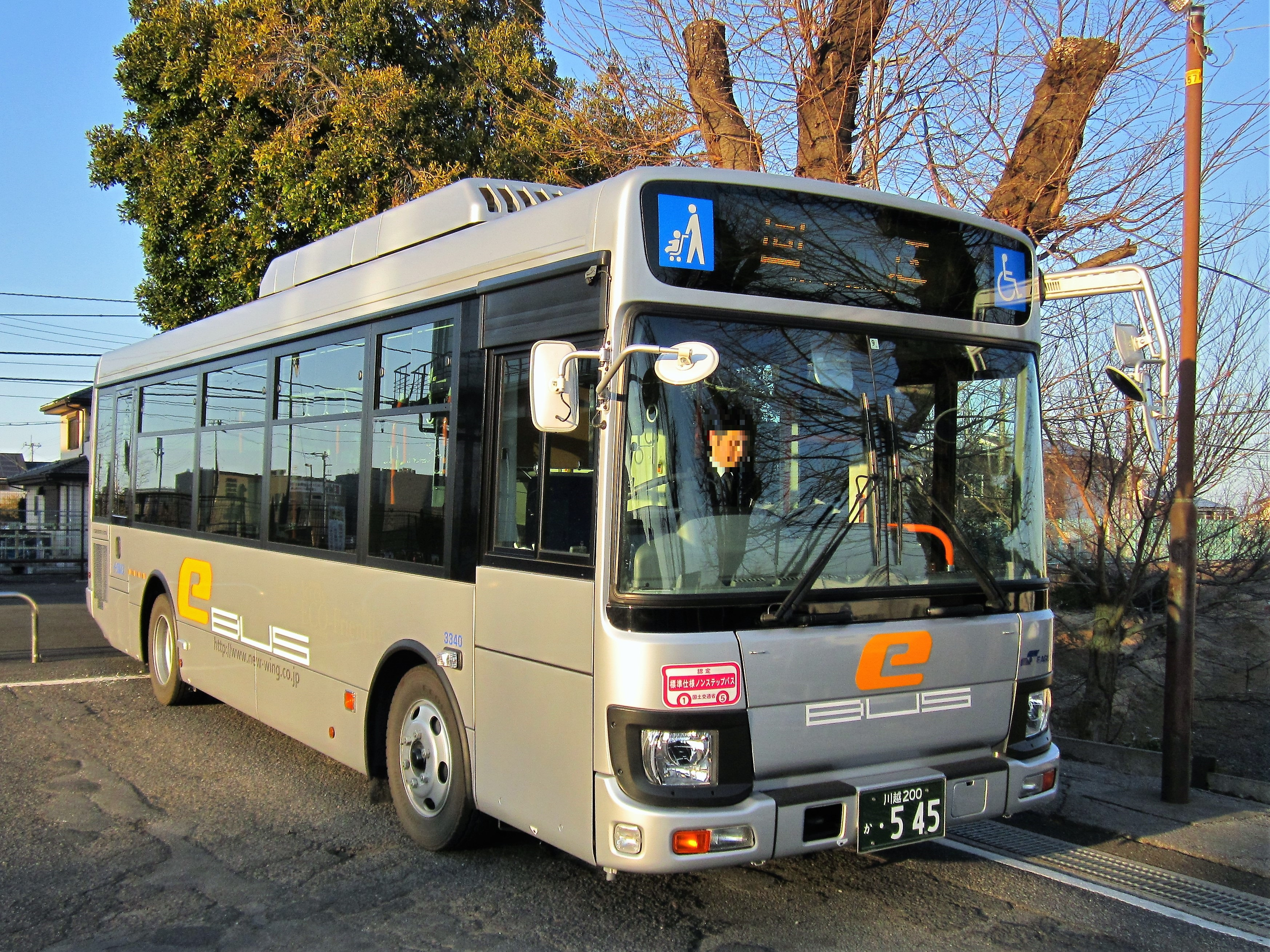 武蔵高萩駅南口に停車中のイーグルバス Canon PowerShot A2200